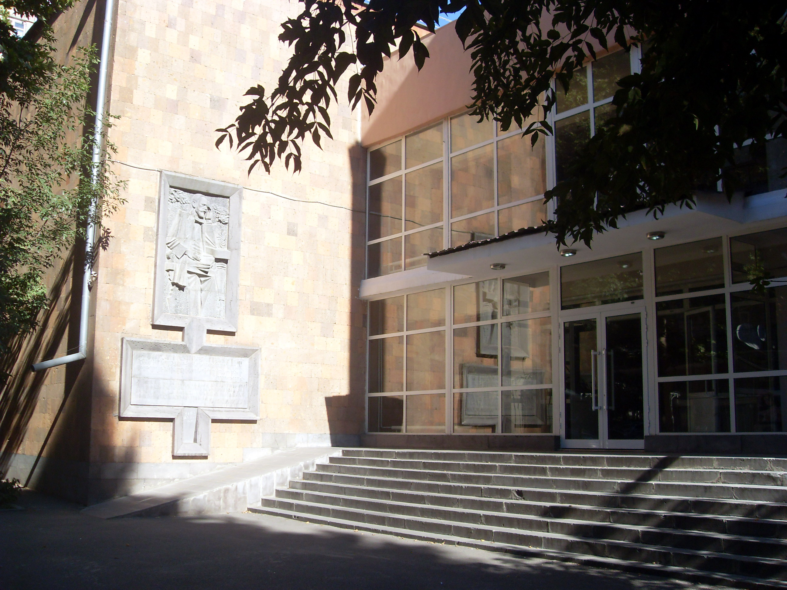 Բարձրաքանդակ «Չայկովսկի», 1982 թ., Պ. Չայկովսկու անվան երաշժտական դպրոցի պատին 6/13